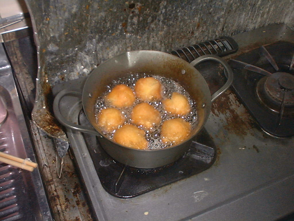 "Sata andagi" Making.サーターアンダーギー